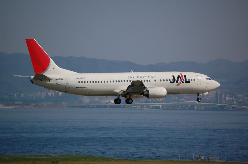 JAL Express Boeing 737-400 landing at Osaka-Kansai airport